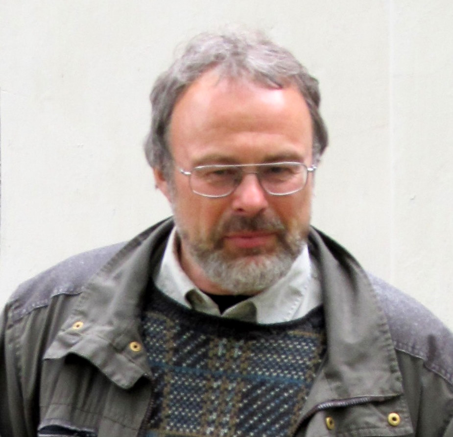 Heiki Valk, eesti arheoloog